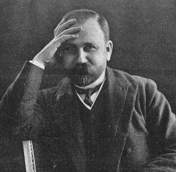 Fredrik Robert Martin (1868-1933) på omslaget av Hvar 8 Dag 1908